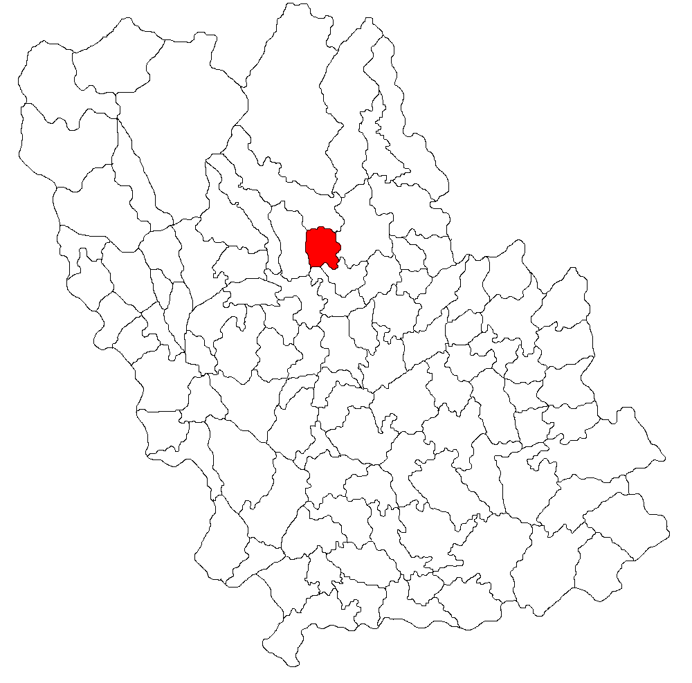 Categorie:Hărţi ale judeţului Prahova